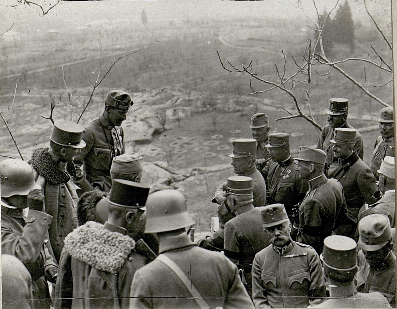 Vor der Besichtigung des Sturmbataillons Selva bei Levico